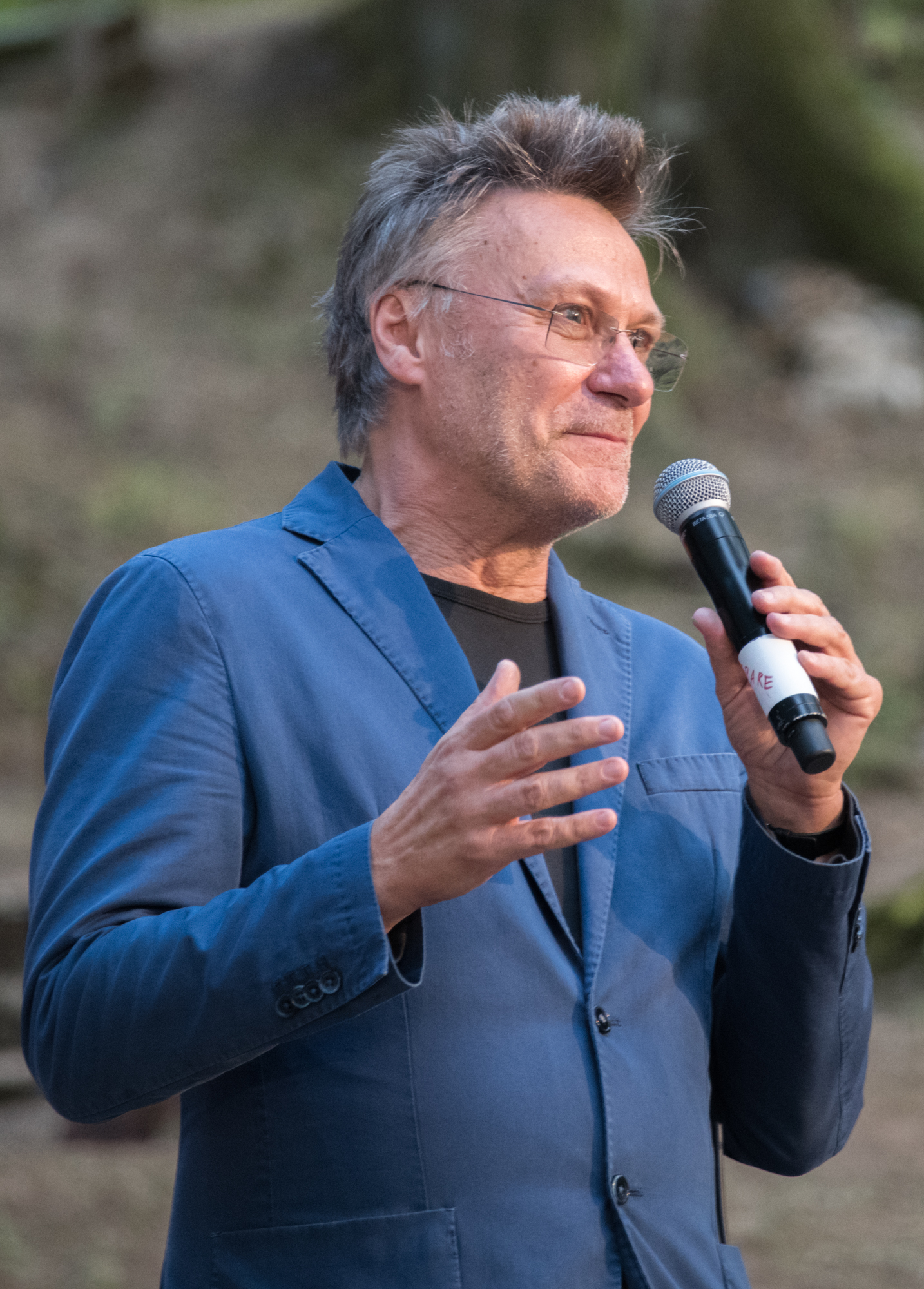 Georg Schmiedleitner bei der Uraufführung von "Der Lebkuchenmann" im Bergwaldtheater Weißenburg